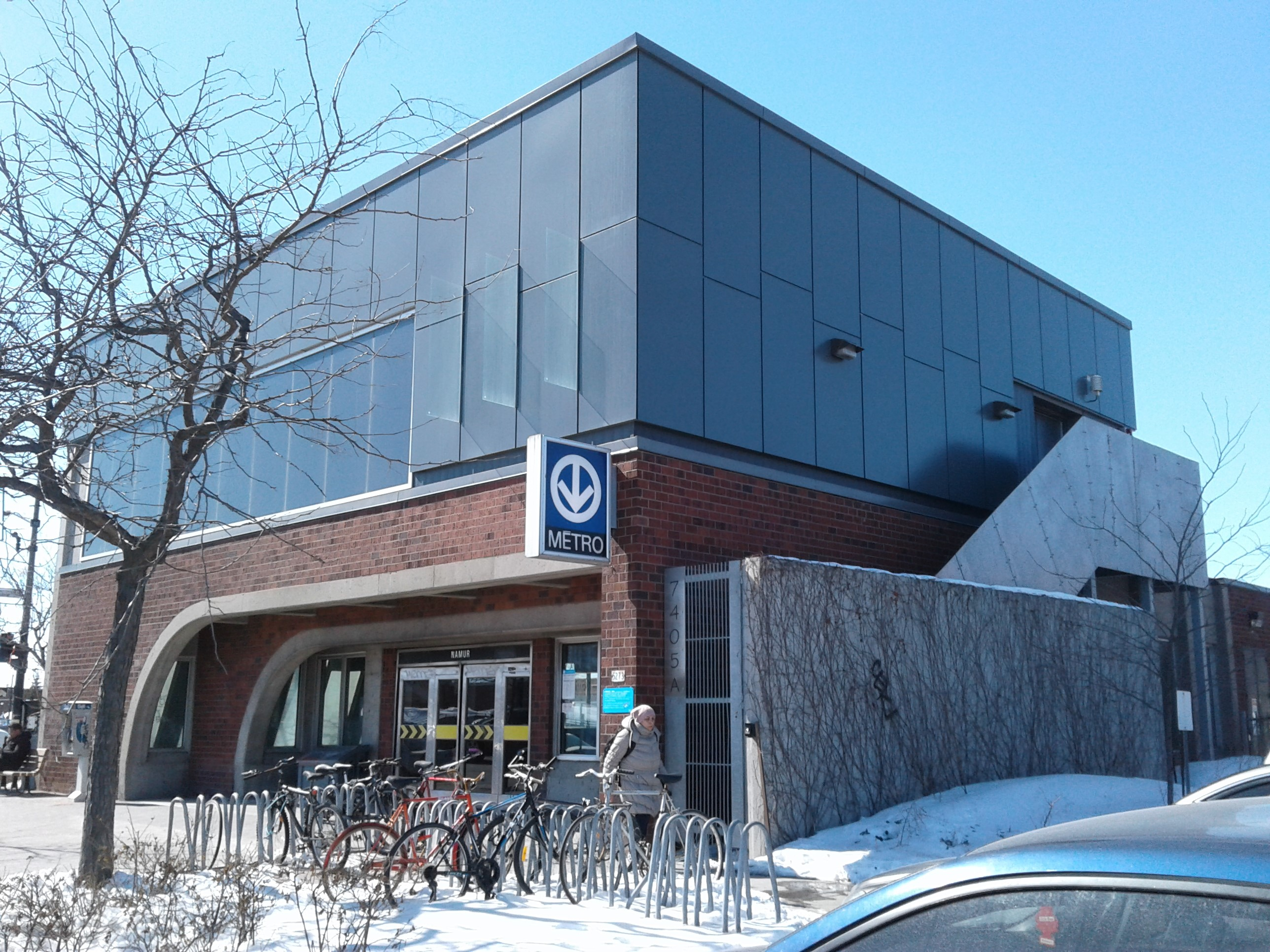 Station de métro Namur, Montréal